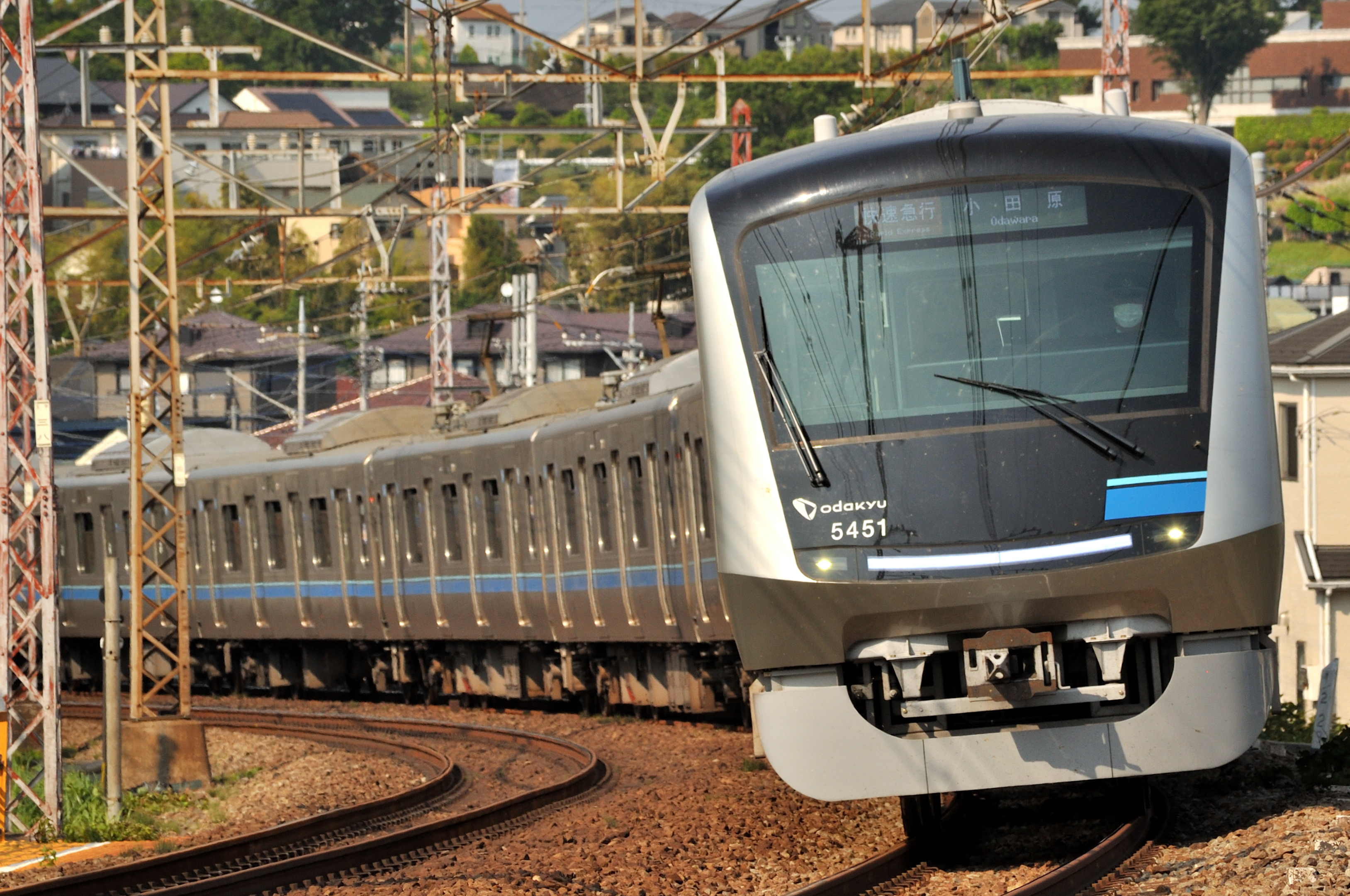 小田急小田原線玉川学園前～町田駅間で撮影しました。 File:Odakyu 5000 Series (2 Generations) 5051F.jpg との区別でファイル名をver.2としています。